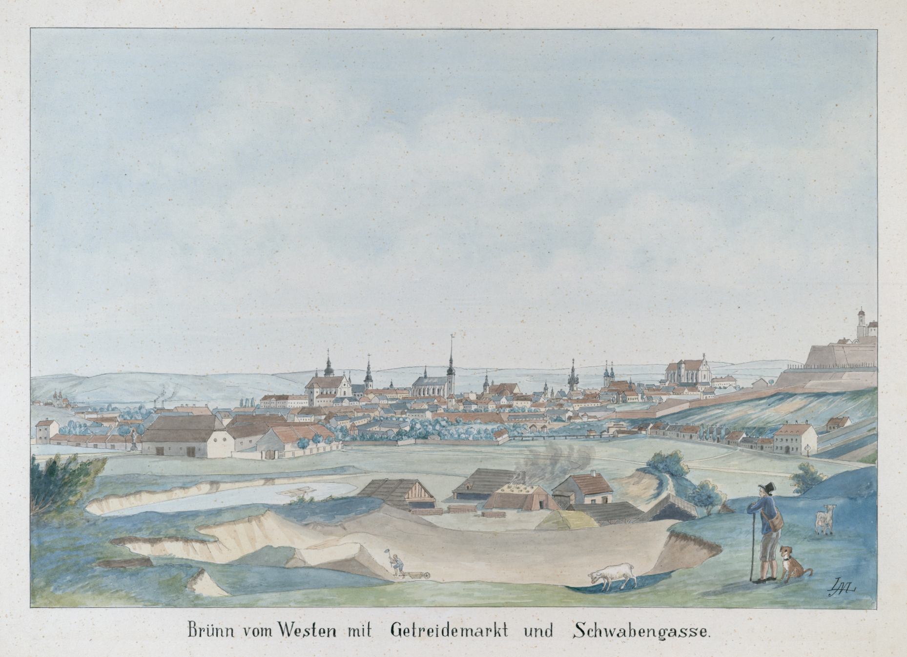 Malba pohledu na dnešní Obilní trh se vsí Švábkou a Brněm v pozadí. Leopold Masur, přelom 19. a 20. století. Rekonstrukce krajiny z první poloviny 19. století v pohledu z úpatí Kraví hory. Cihelná jáma v popředí byla přibližně v místech křížení dnešních ulic Jana Uhra a Úvoz. Dvůr po levé straně byl přibližně v místech křížení ulic Grohova a Veveří